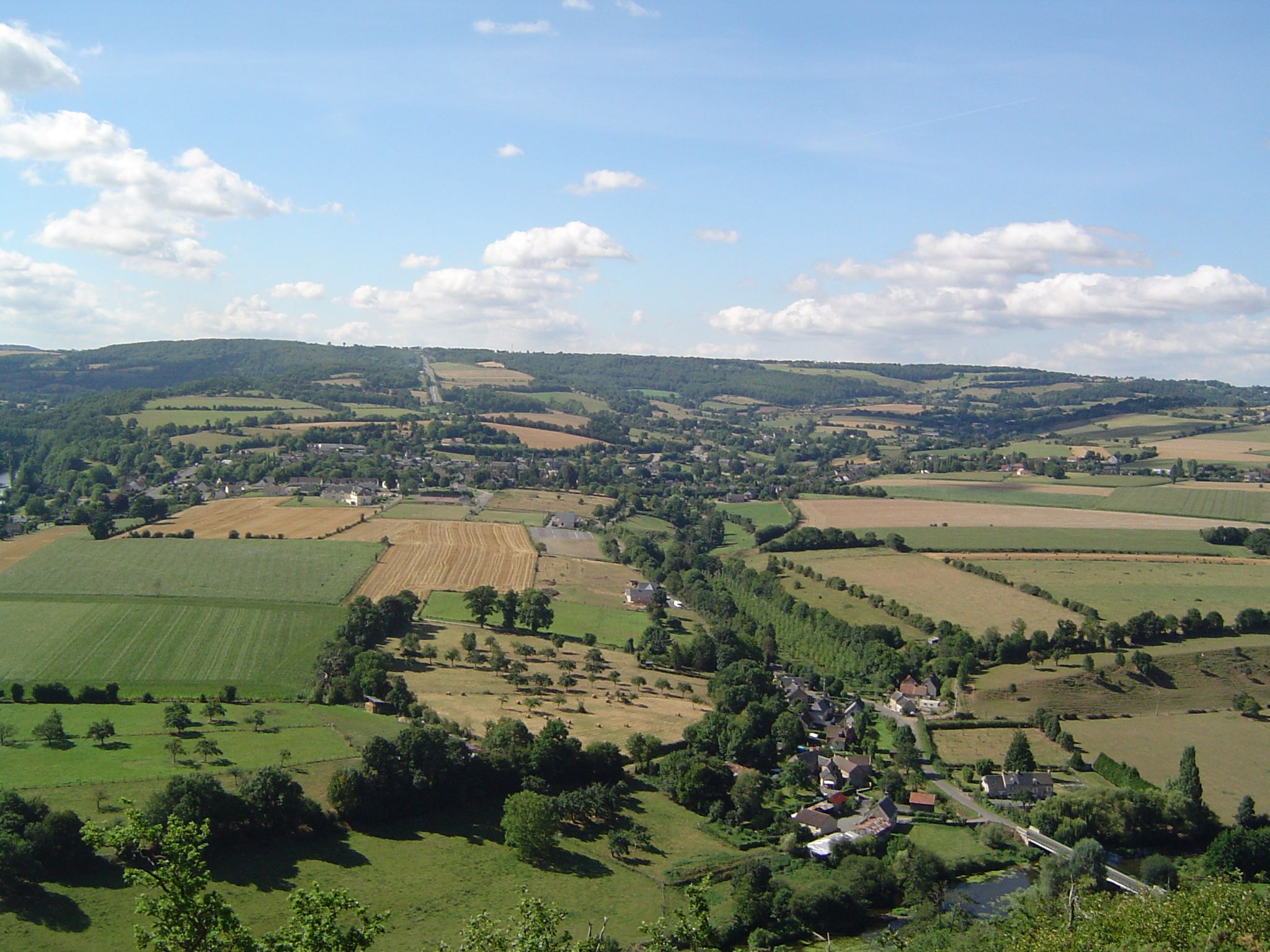 Photo du village Clécy dans le Calvados. Photo prise depuis les contreforts rocheux qui bordent l'Orne. 2005. Cevenol2